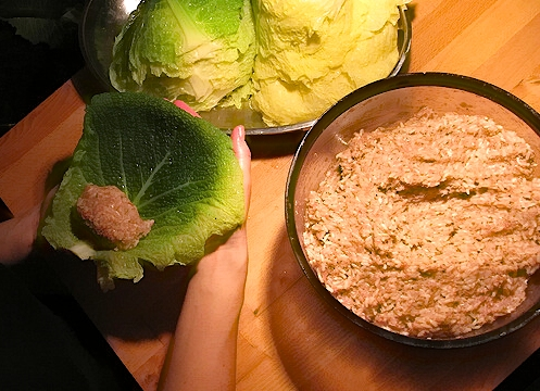 Zubereitung von Wirsingkohlrouladen, hier: Einfüllen einer Portion der Hackfleischmasse in blanchierte Wirsingkohlblätter.